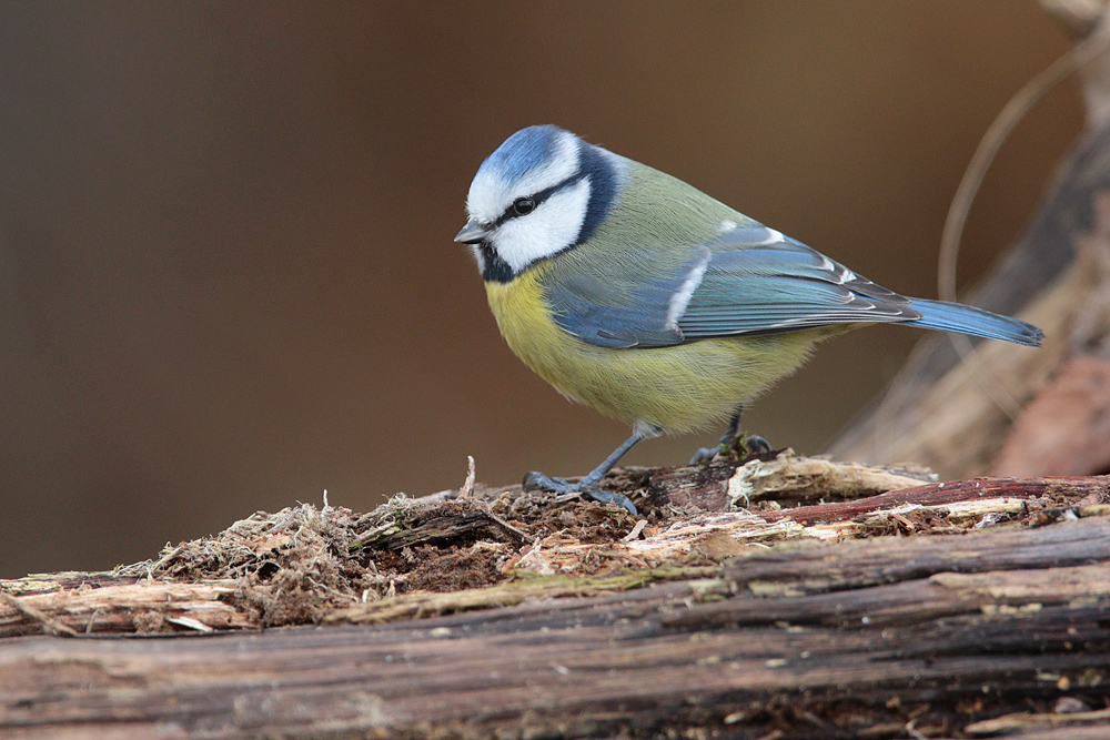 Blaumeise in der Nähe des Ilkerbruchs